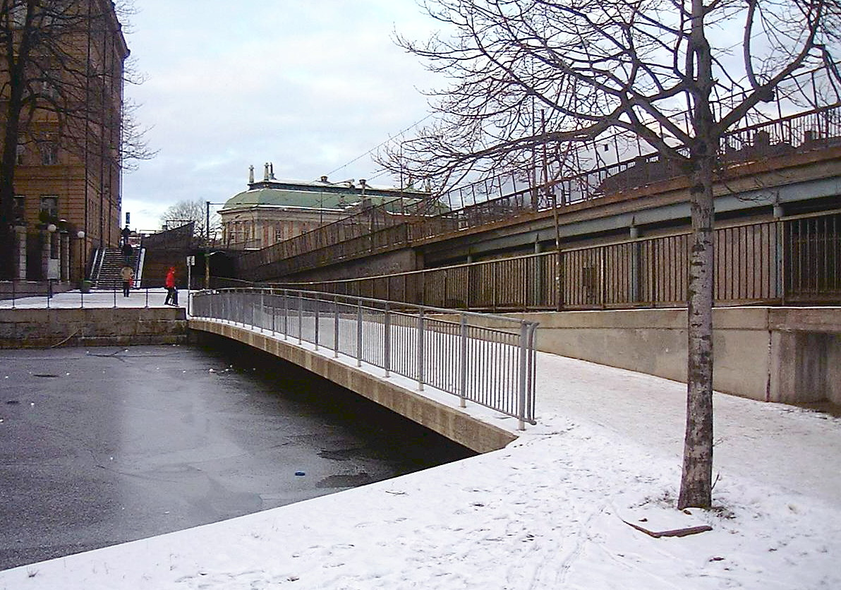 Hebbes Bro, Stockholm, in February 2007.